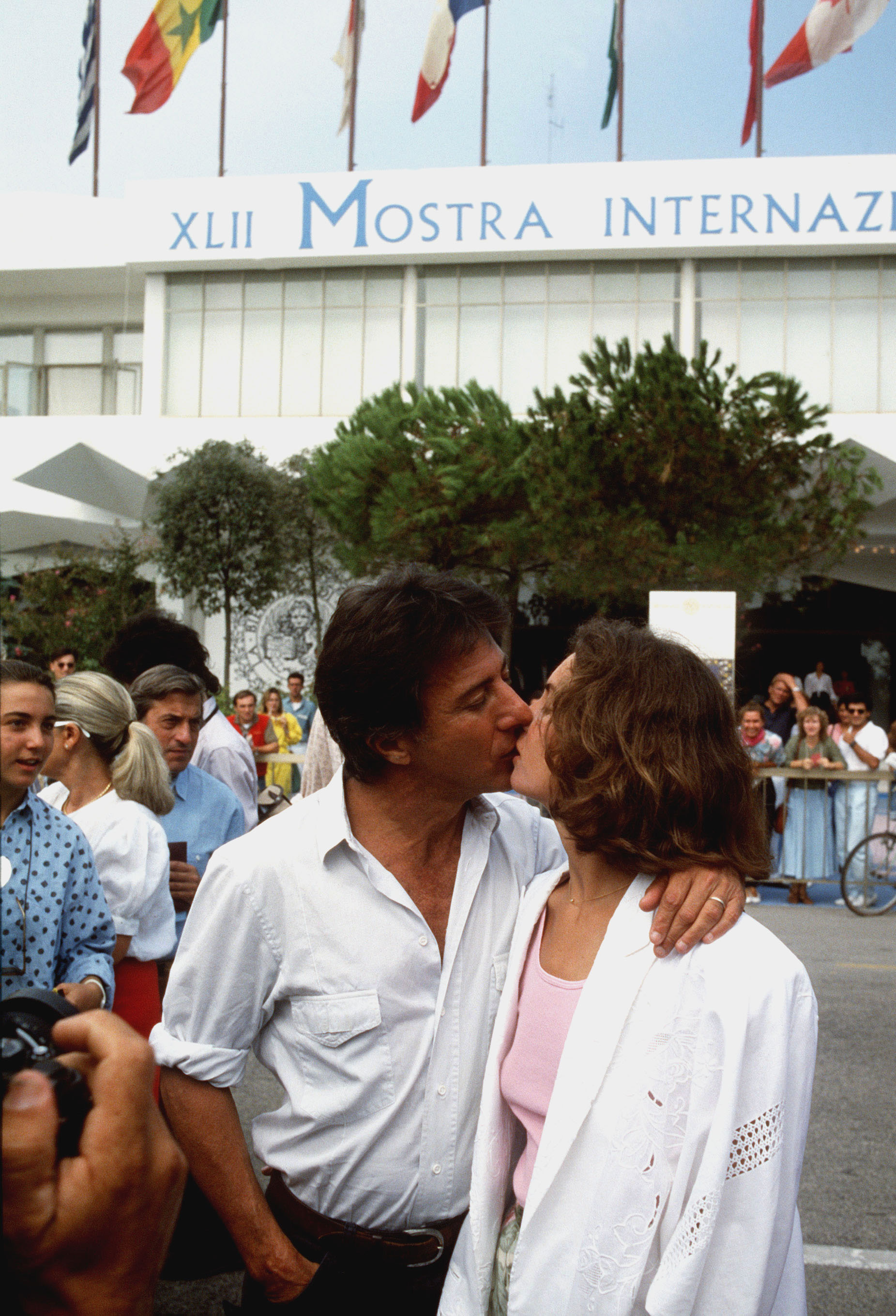 L'attore americano Dustin Hoffman con la moglie Lisa alla Mostra del cinema di Venezia del 1989